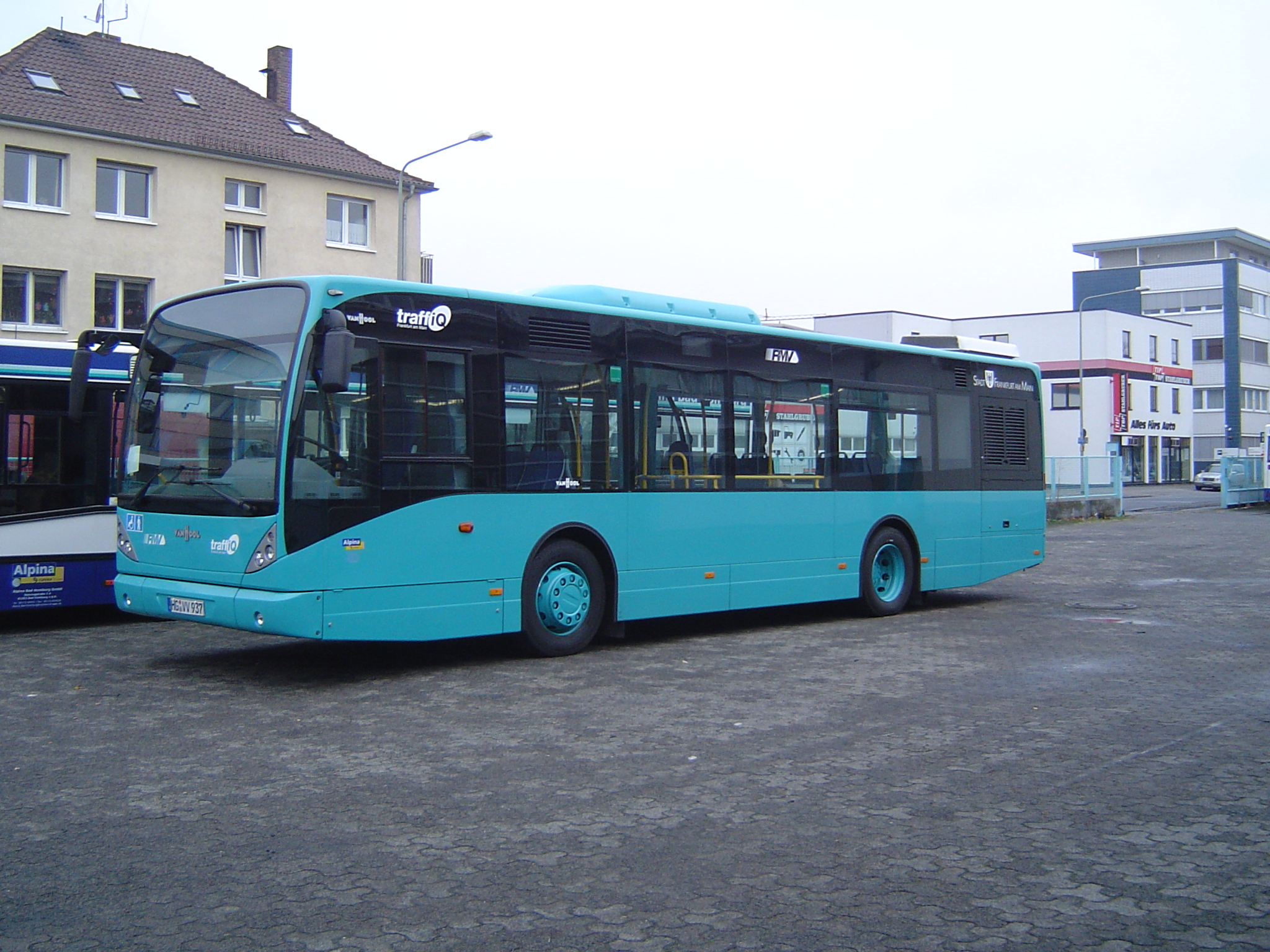 Midifahrzeug für das Frankfurter Linienbündel A, VanHool NewA330 mit EEV-Dieselstandard